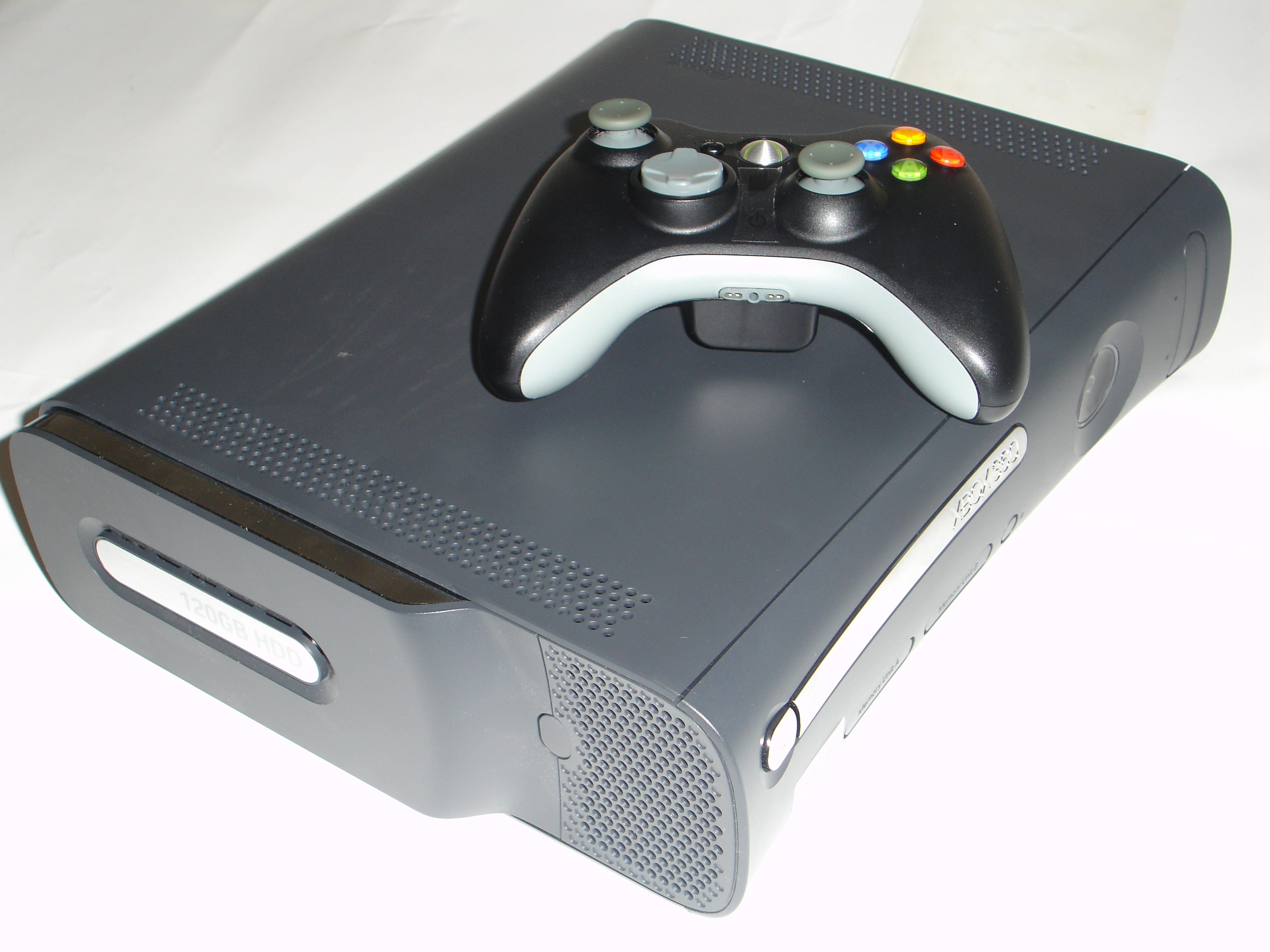 Xbox 360 Elite